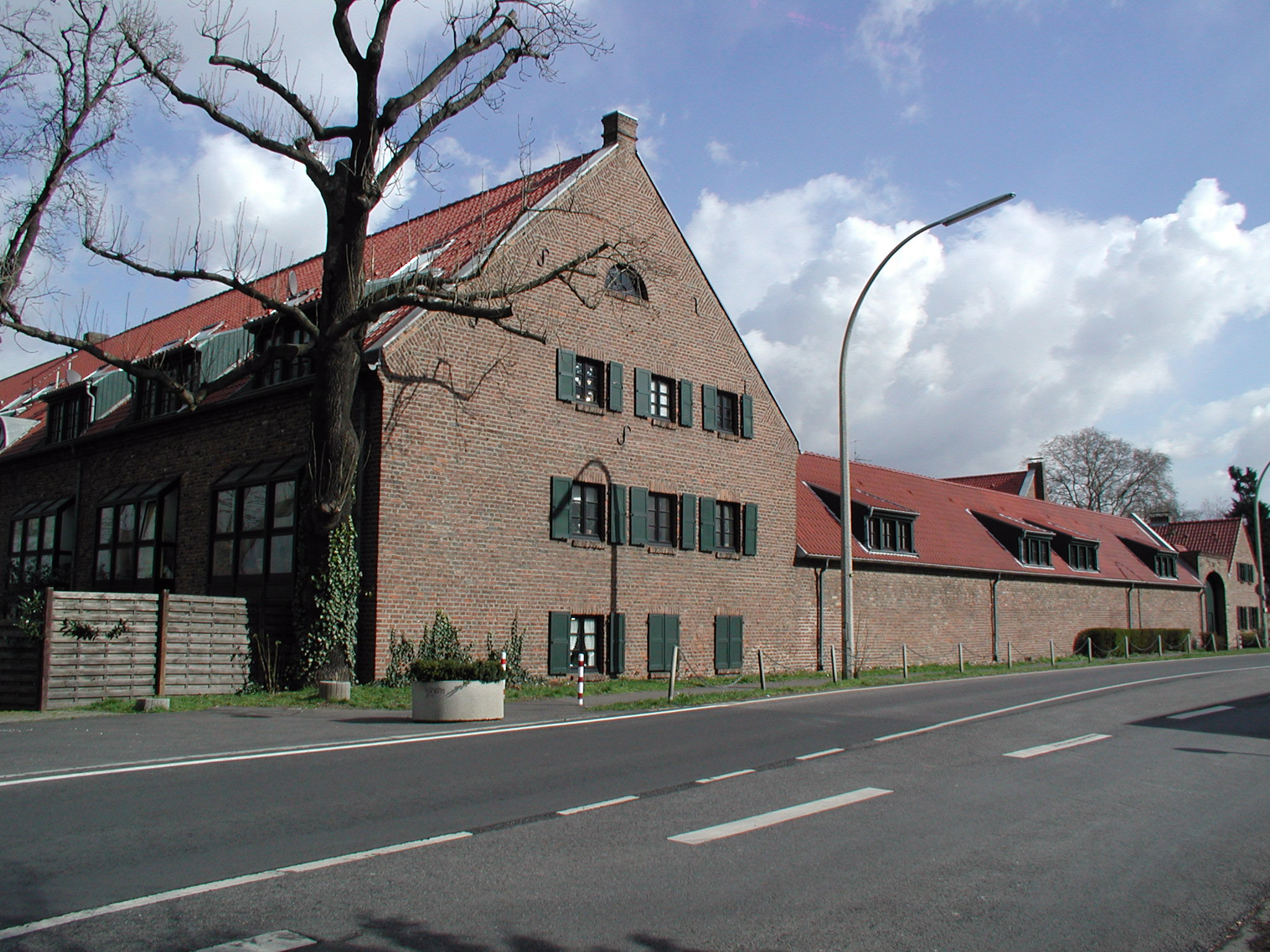 Rondorf, Johannishof This is a photograph of an architectural monument.